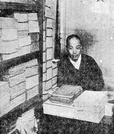 1931년 3월 30일자 동아일보에 실린 뒷방 서재 안의 정인보